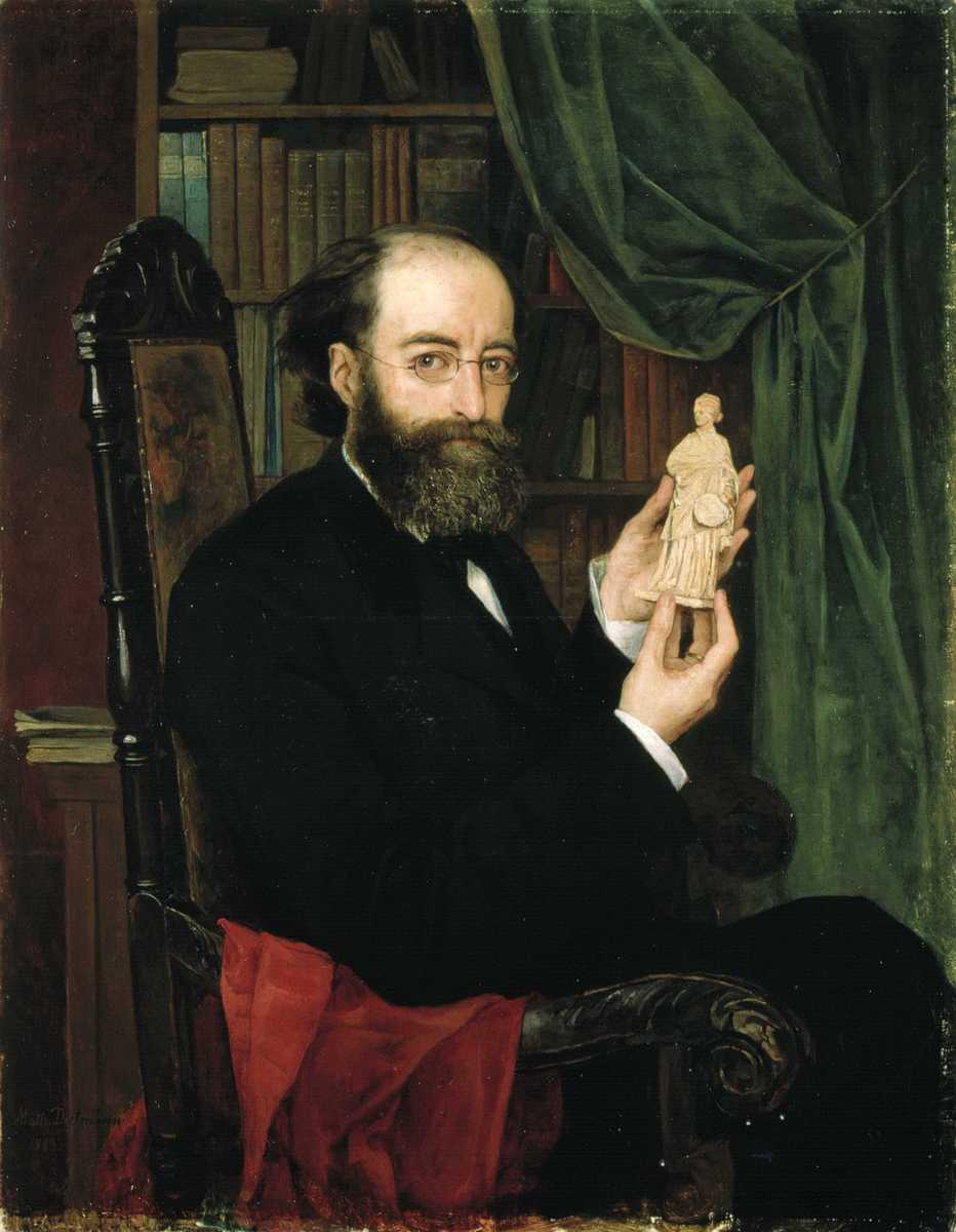 Norwegian: Portrett av ektefellen Lorentz Dietrichson.label QS:Lno,"Portrett av ektefellen Lorentz Dietrichson."